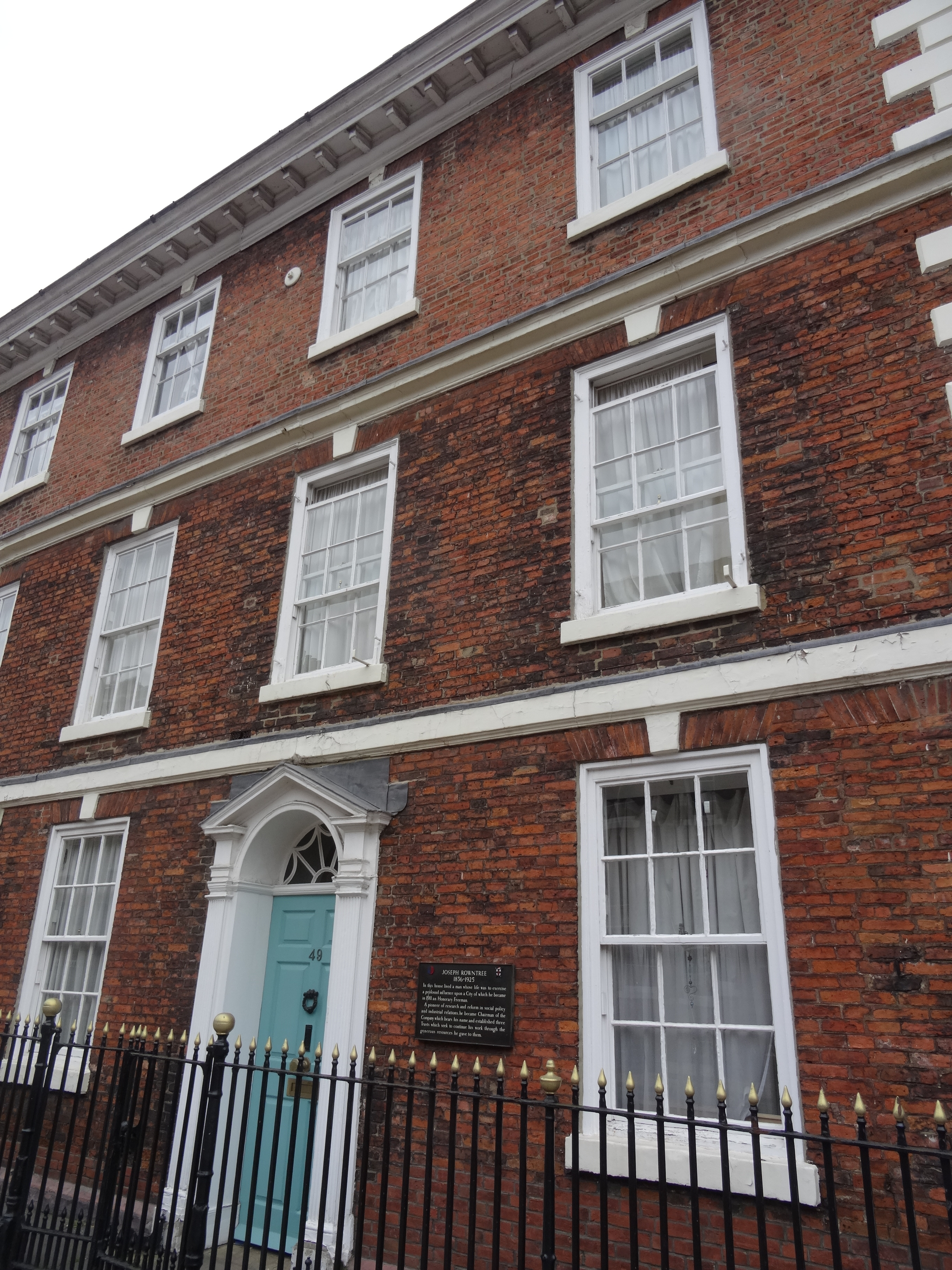 Maison de Joseph Rowntree à York.